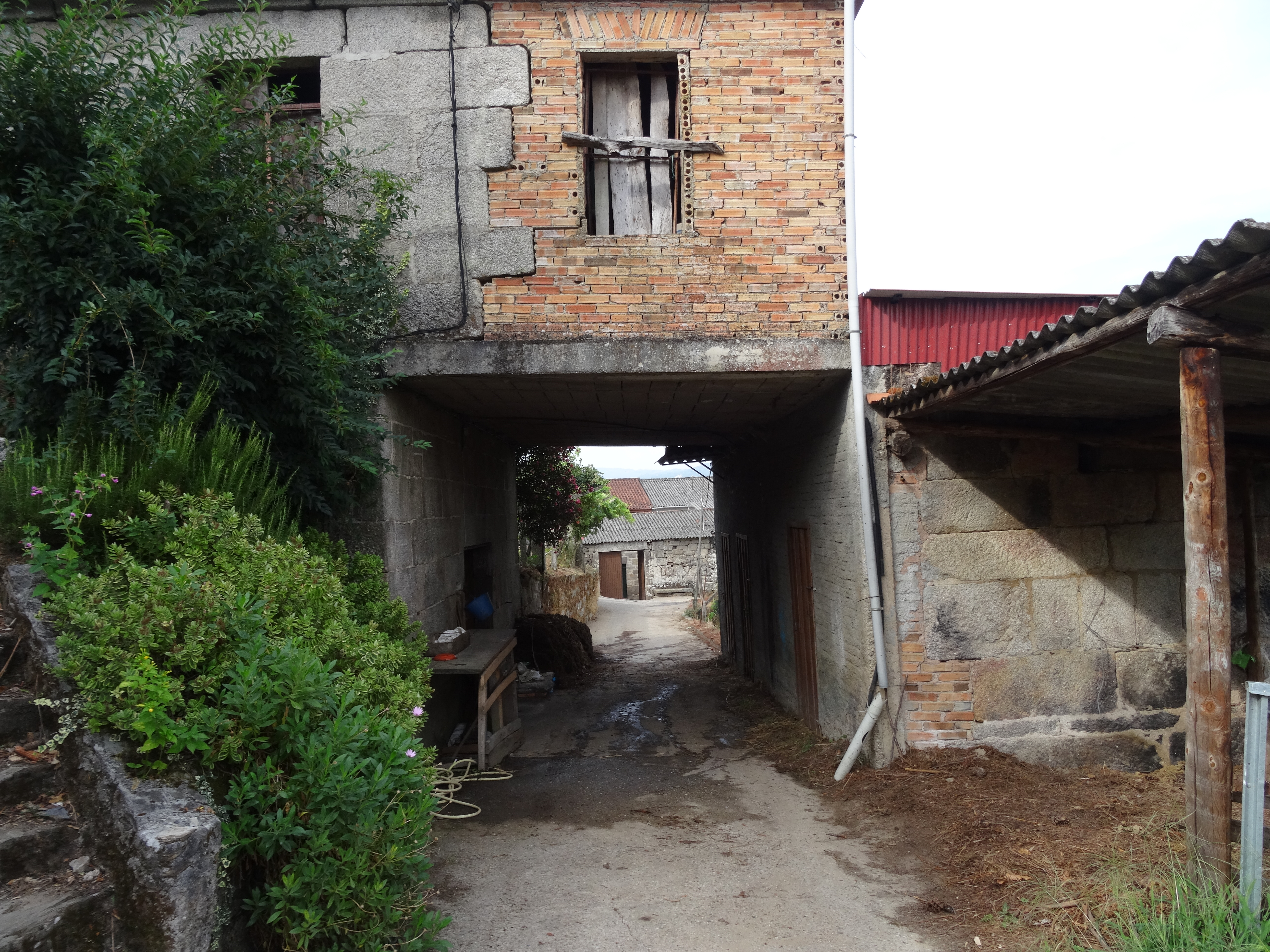 Ver título.